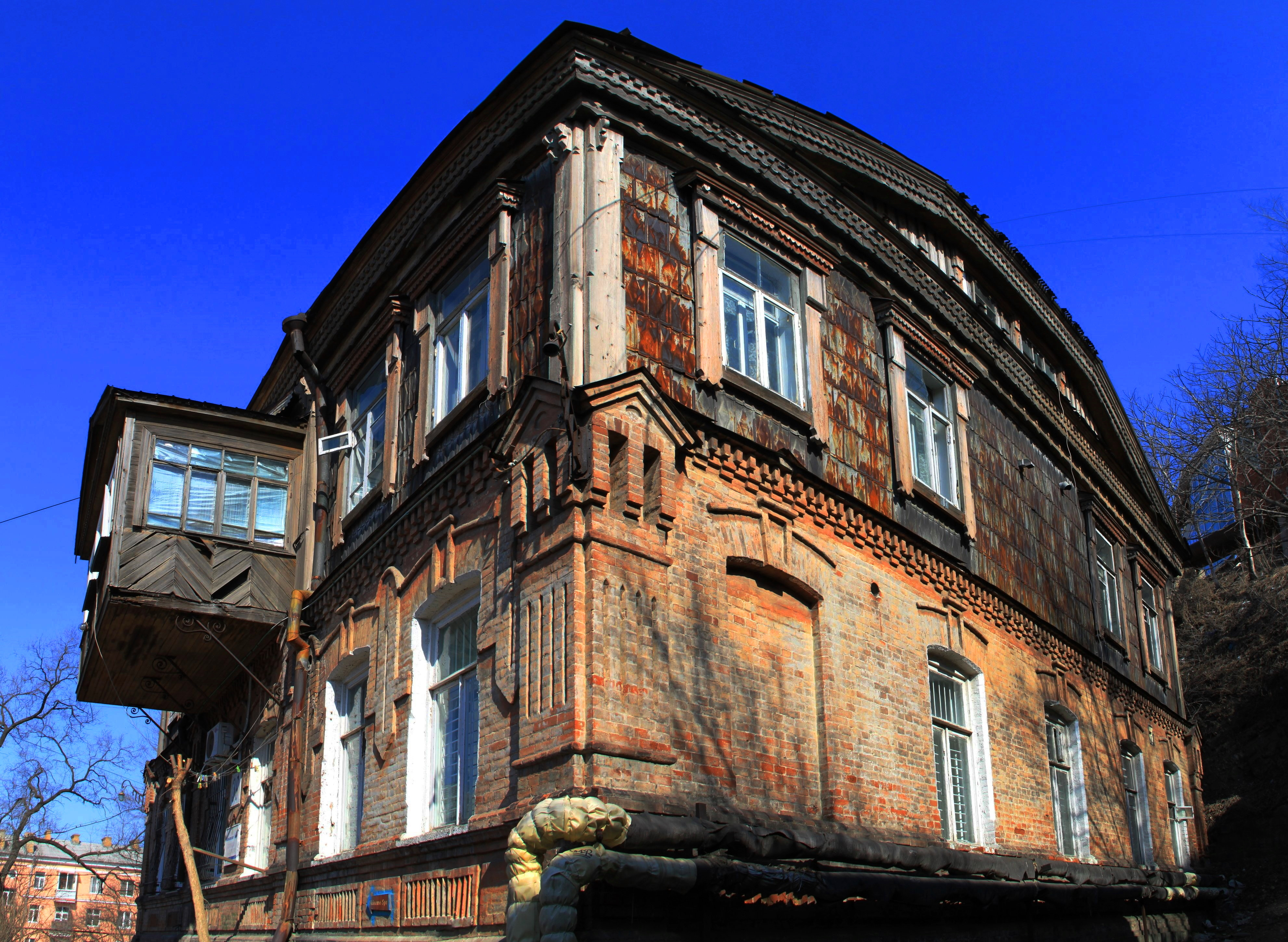 Ансамбль жилых домов. образец застройки улицы (Приморский край, Владивосток, светланская улица, 39)